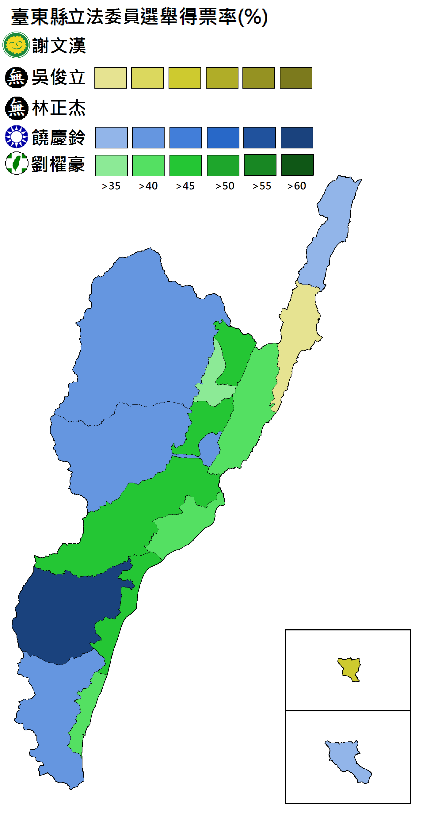 2012立委選舉